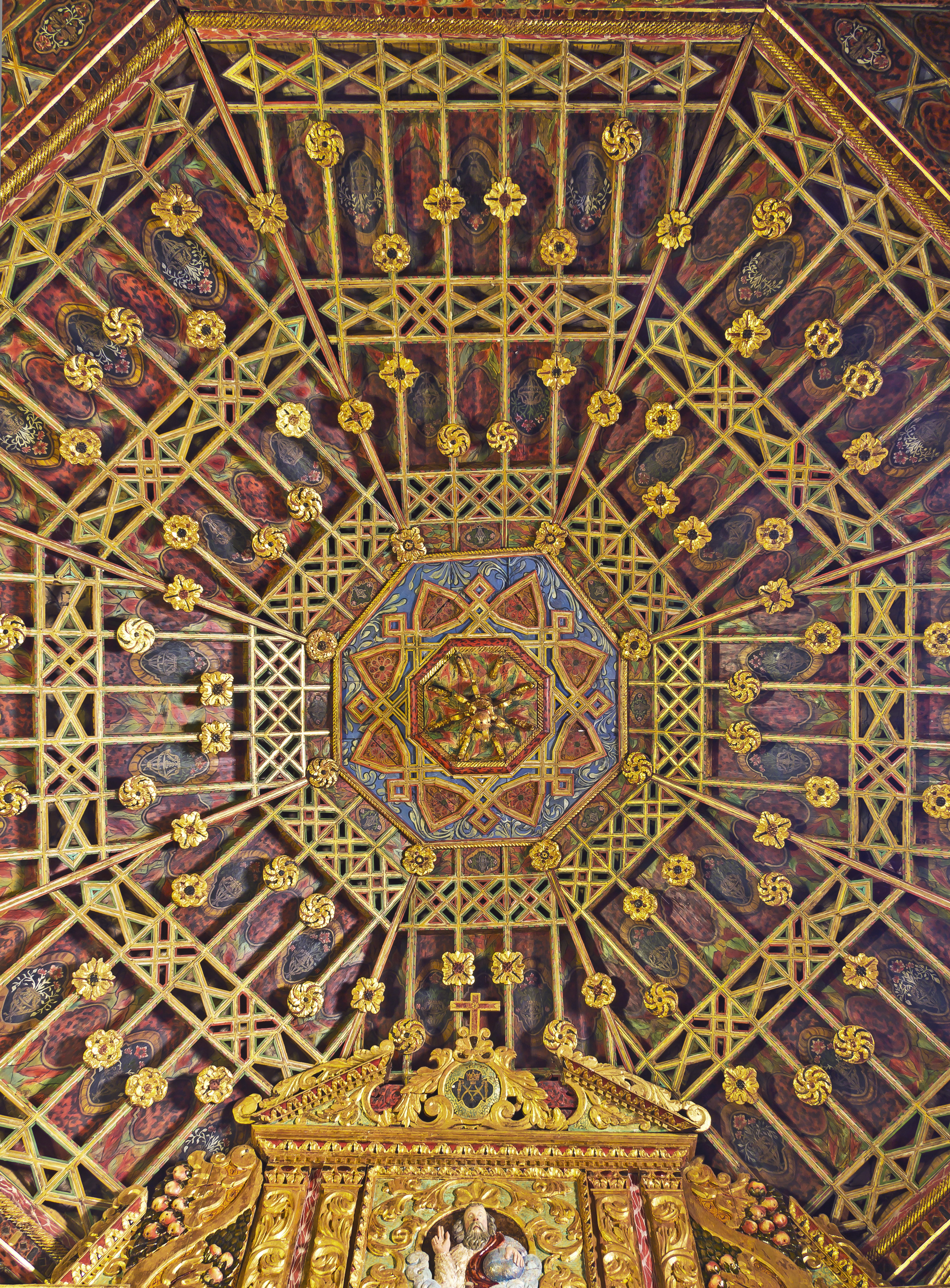 Decke über dem Altar des rechten Seitenschiffs der Kirche Santa Catalina in Tacoronte (Teneriffa)